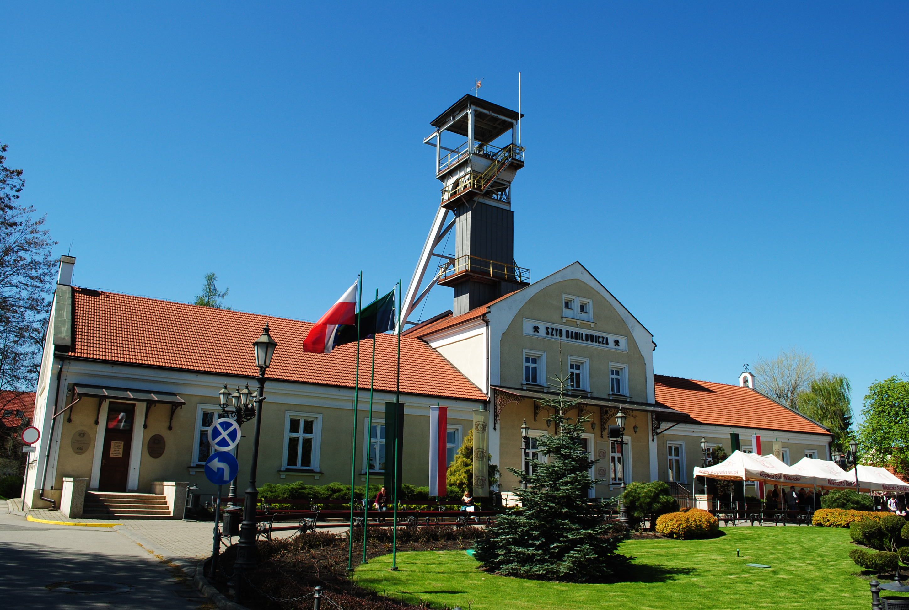 Wieliczka. Szyb Daniłowicza